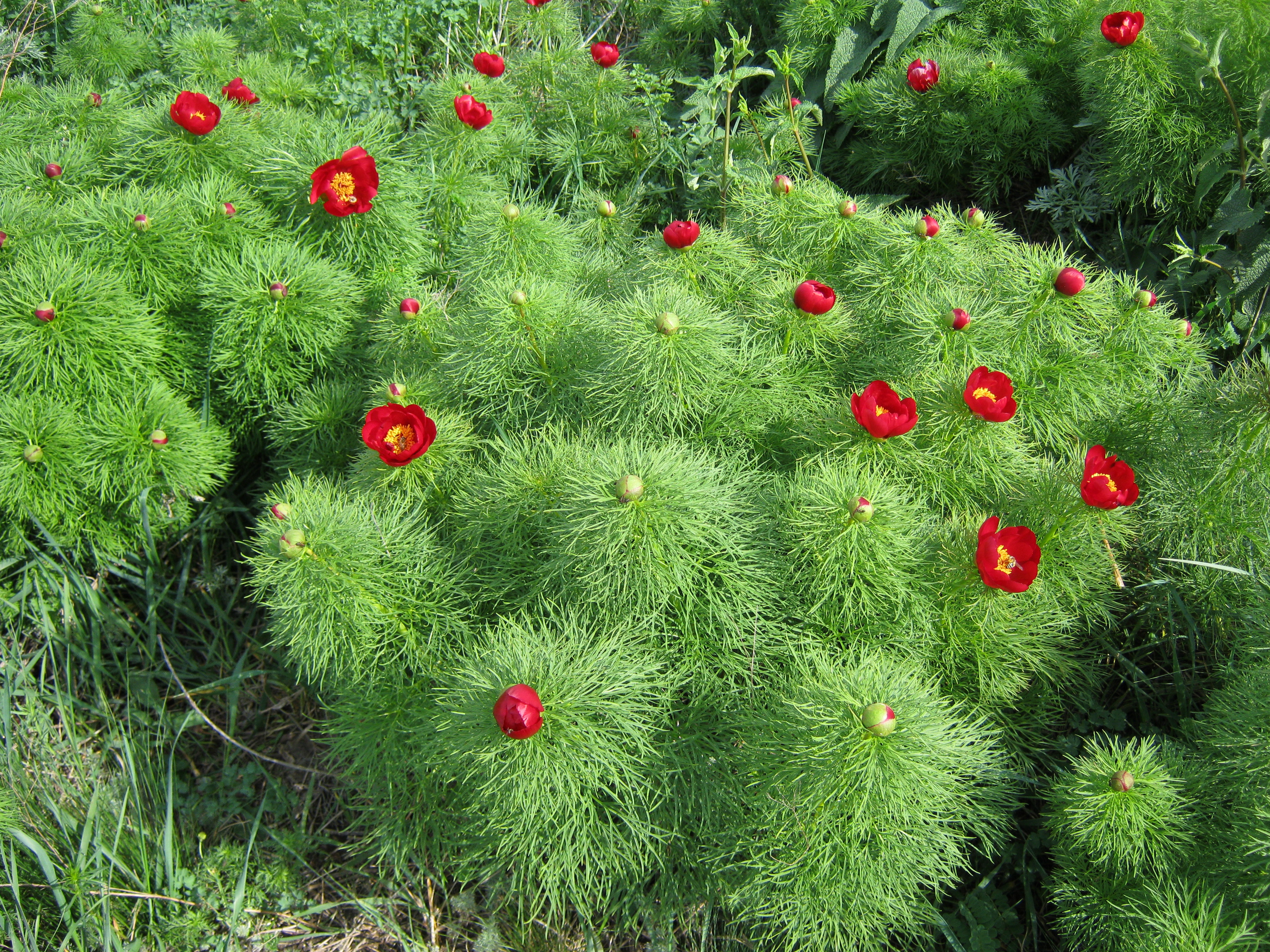 Півонії вузьколисті на території пам'ятника природи місцевого значення Гектова балка у Добропільському районі Донецької області.